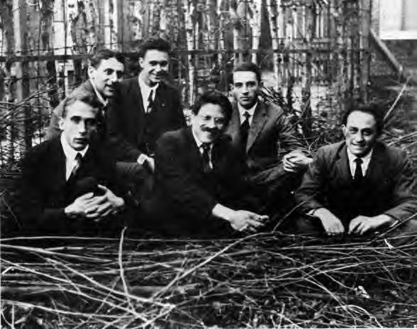 Ehrenfest's students, Leiden 1924.. People on the picture from left to right: Gerhard Heinrich Dieke, Samuel Abraham Goudsmit, Jan Tinbergen, Paul Ehrenfest, Ralph Kronig, Enrico Fermi.